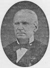 Foto van Don Pedro José Carbo y Noboa (1813-1894/1895), Ecuadoraans politicus, Jefe Supremo van Guayal in 1883.